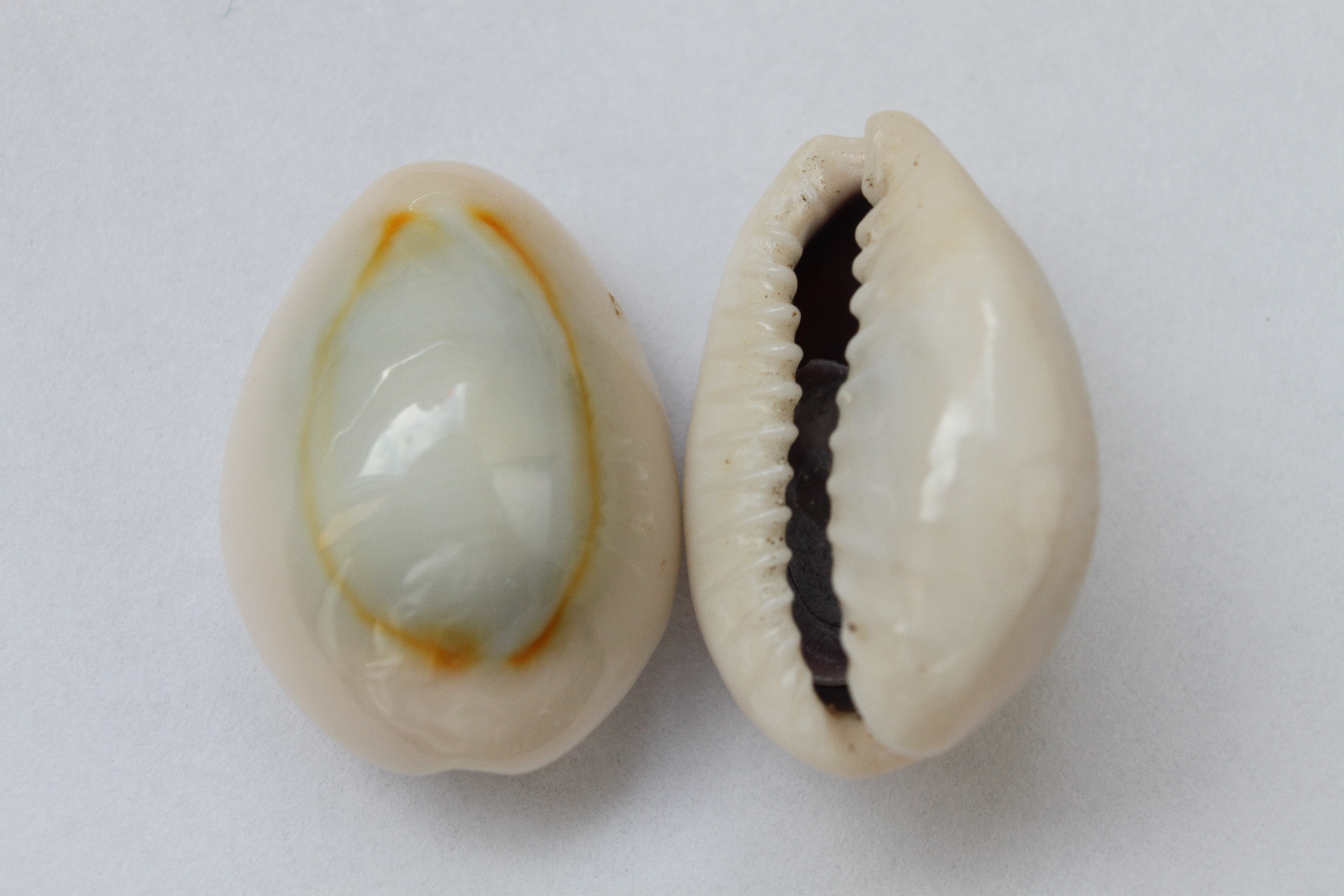 Gehäuse der Monetaria annulus (Ringkauri)), teilweise aufgefräst. Diese wurden neben der Monetaria moneta (Geldkauri) als Kaurigeld verwendet